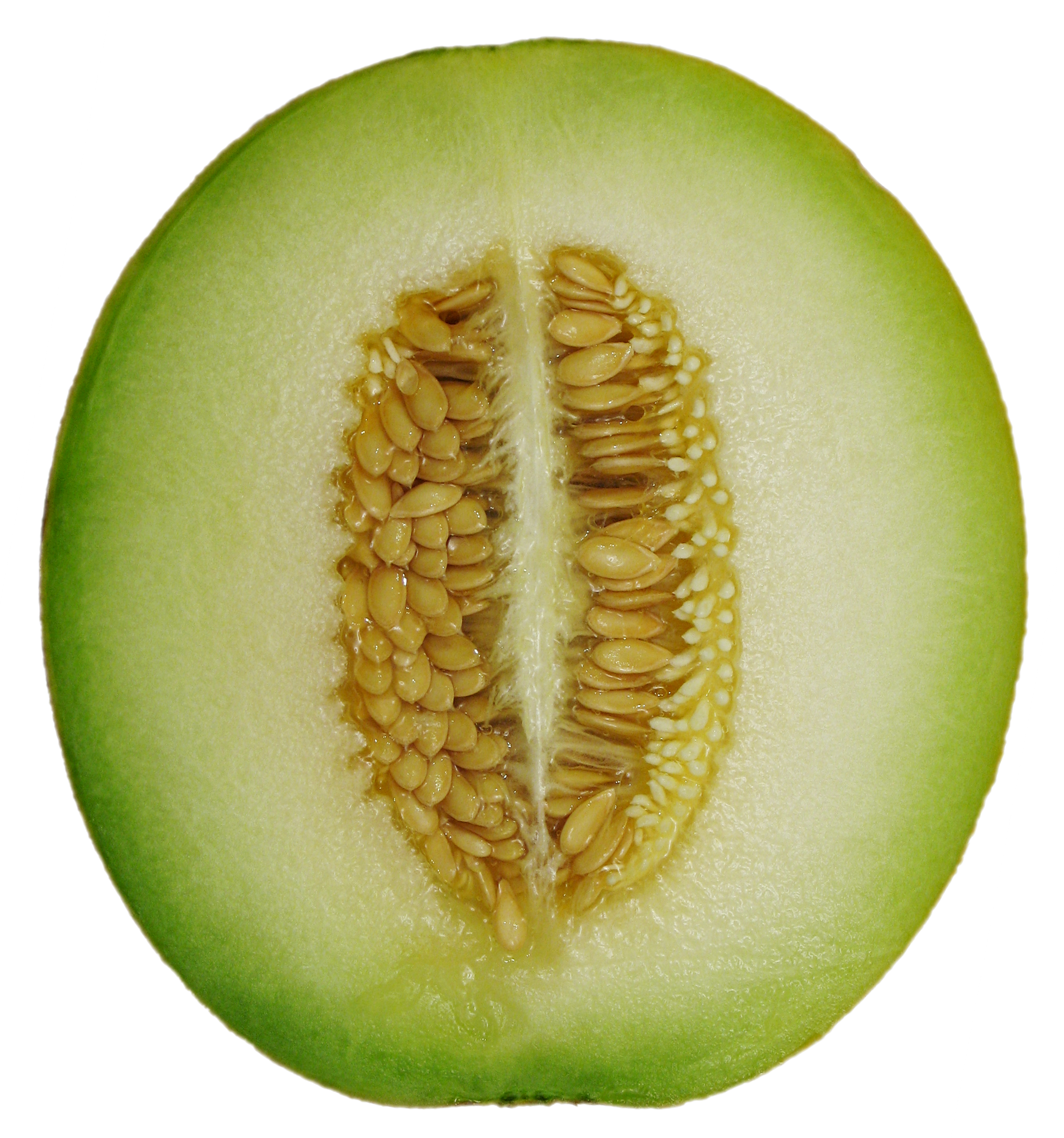 Cantaloupe Melon cross section